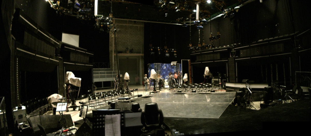 Hrvatska radiotelevizija, Zagreb